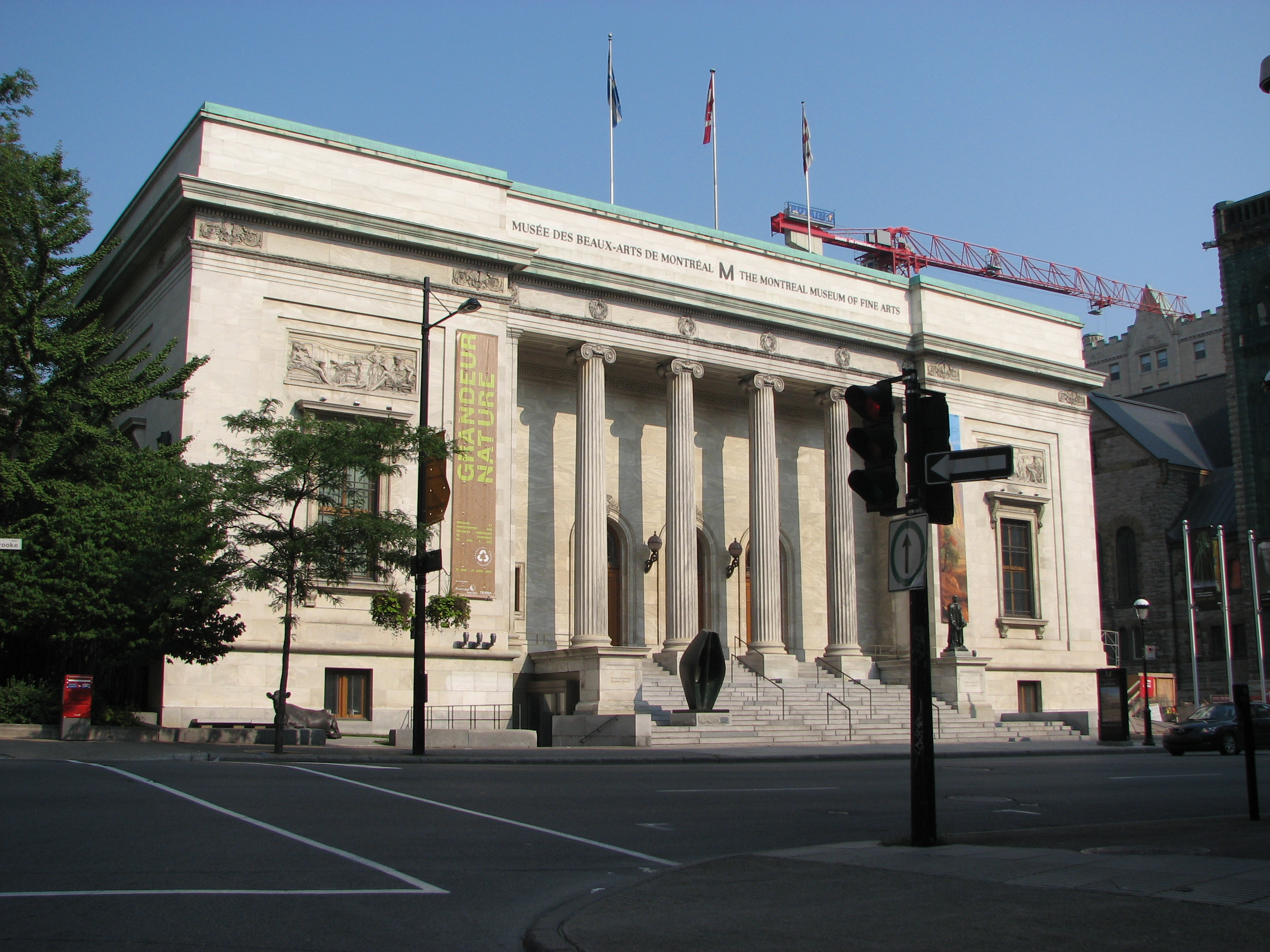 Bâtiment de 1912 du Musée des beaux-arts de Montréal.